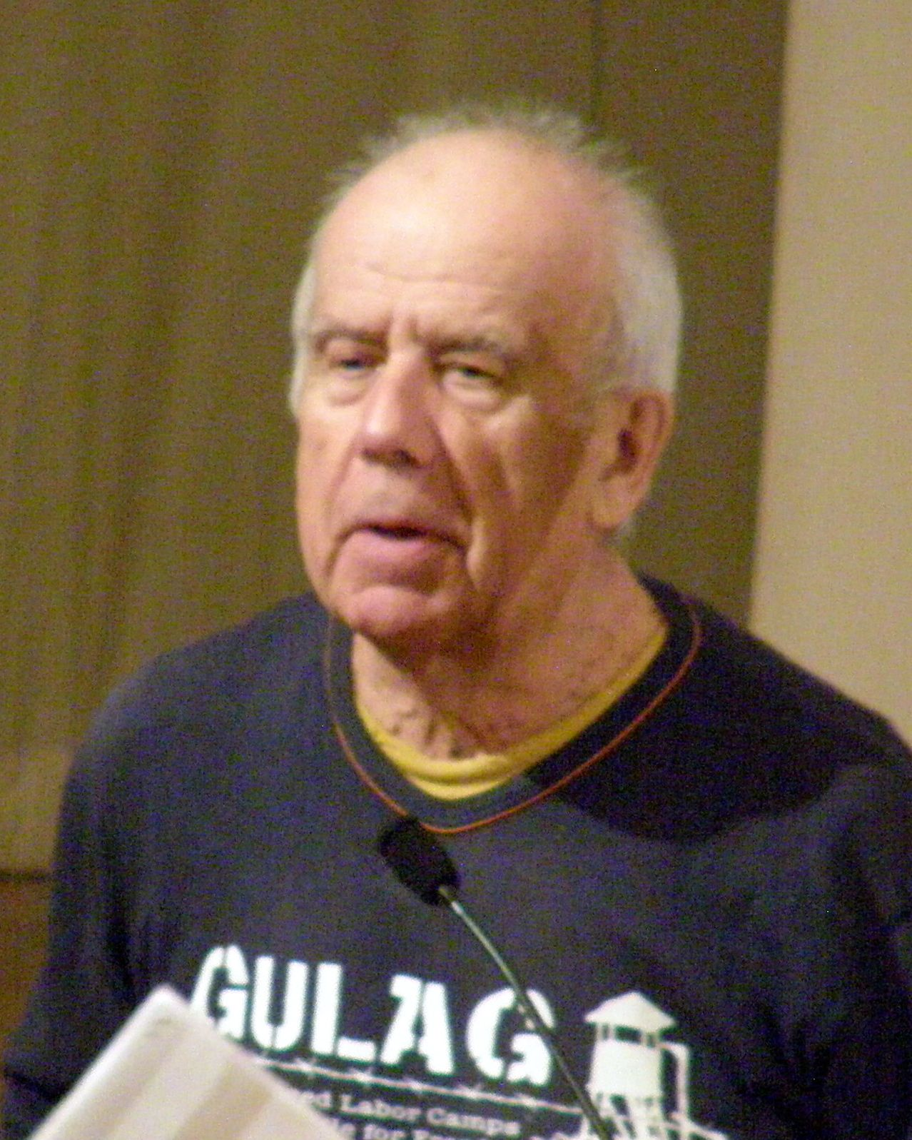 Mart Niklus Rahvusraamatukogus esinemas Eesti piirikonverentsil